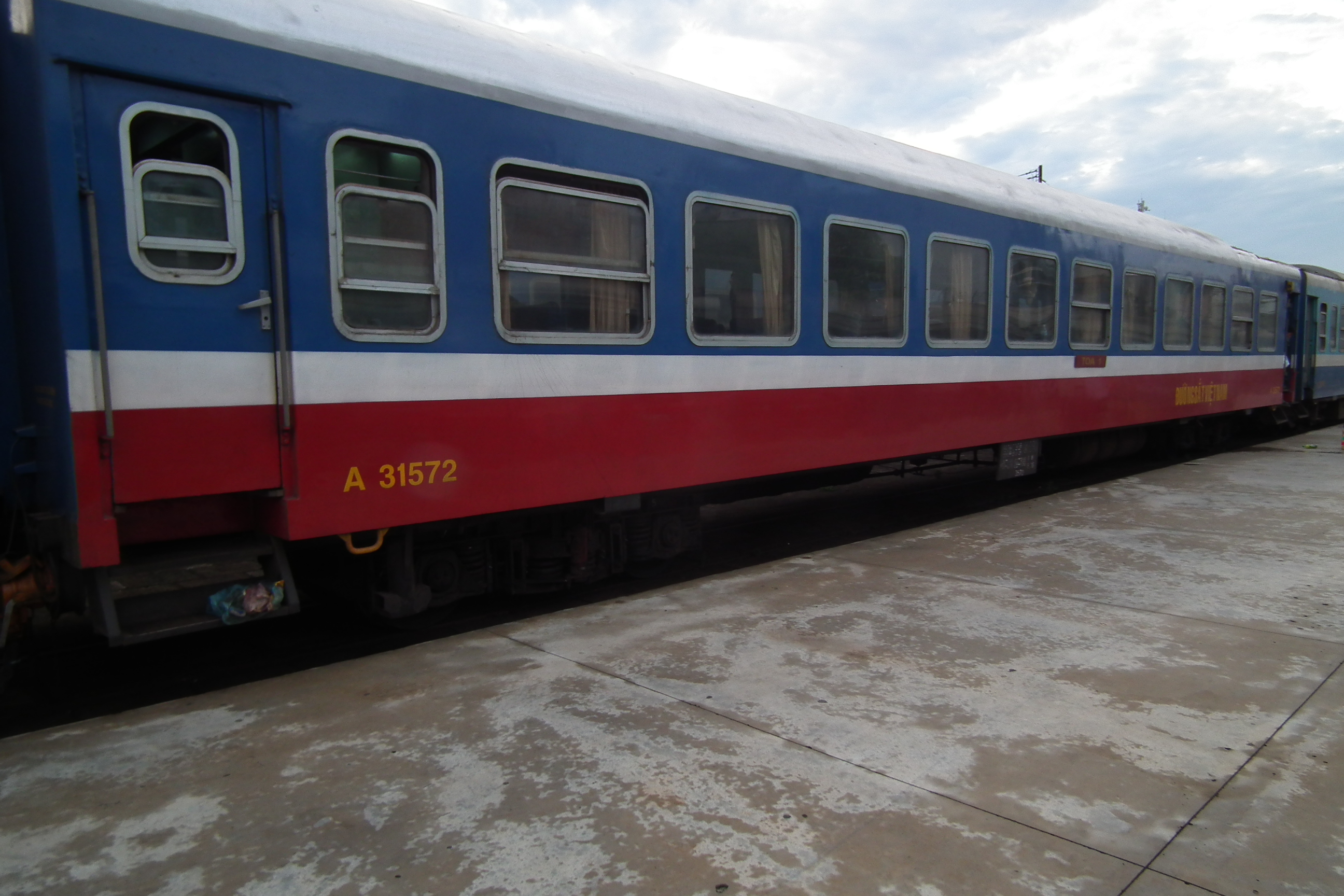 Saigon Railway Station,Ga Sài Gòn，Ga柴棍,サイゴン駅